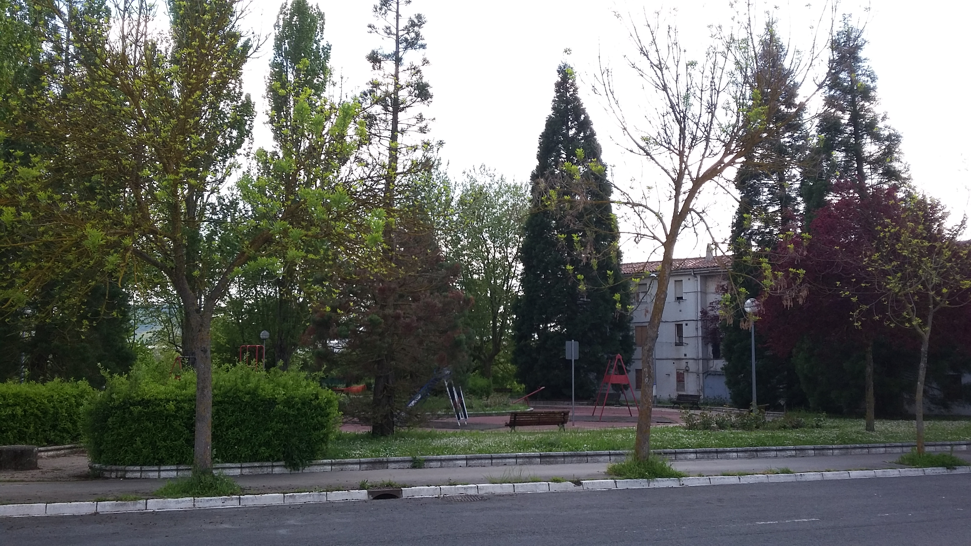 Barrio de Errekaleor, Vitoria-Gasteiz, Álava, País Vasco (España). Parque.